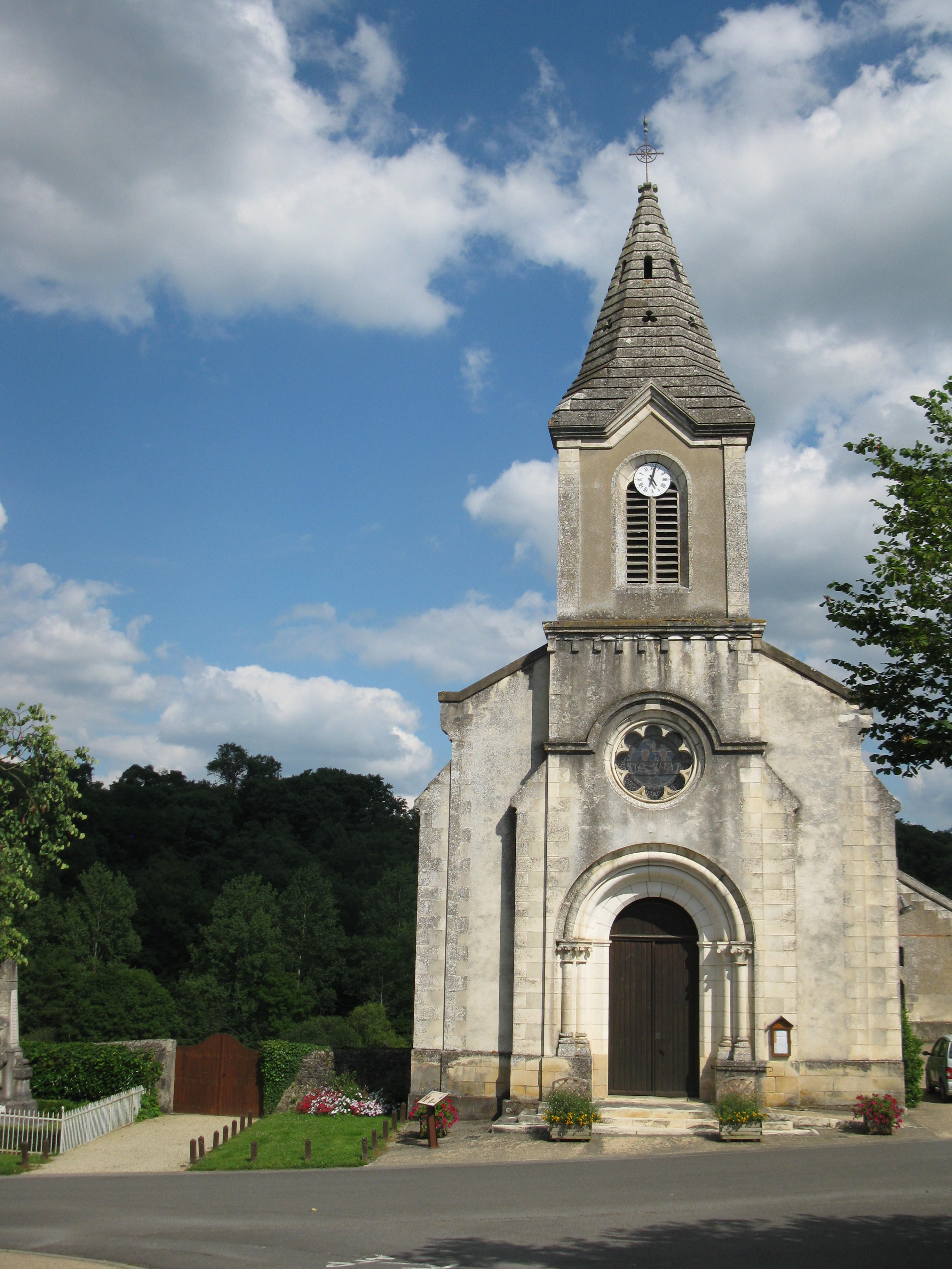 Eglise